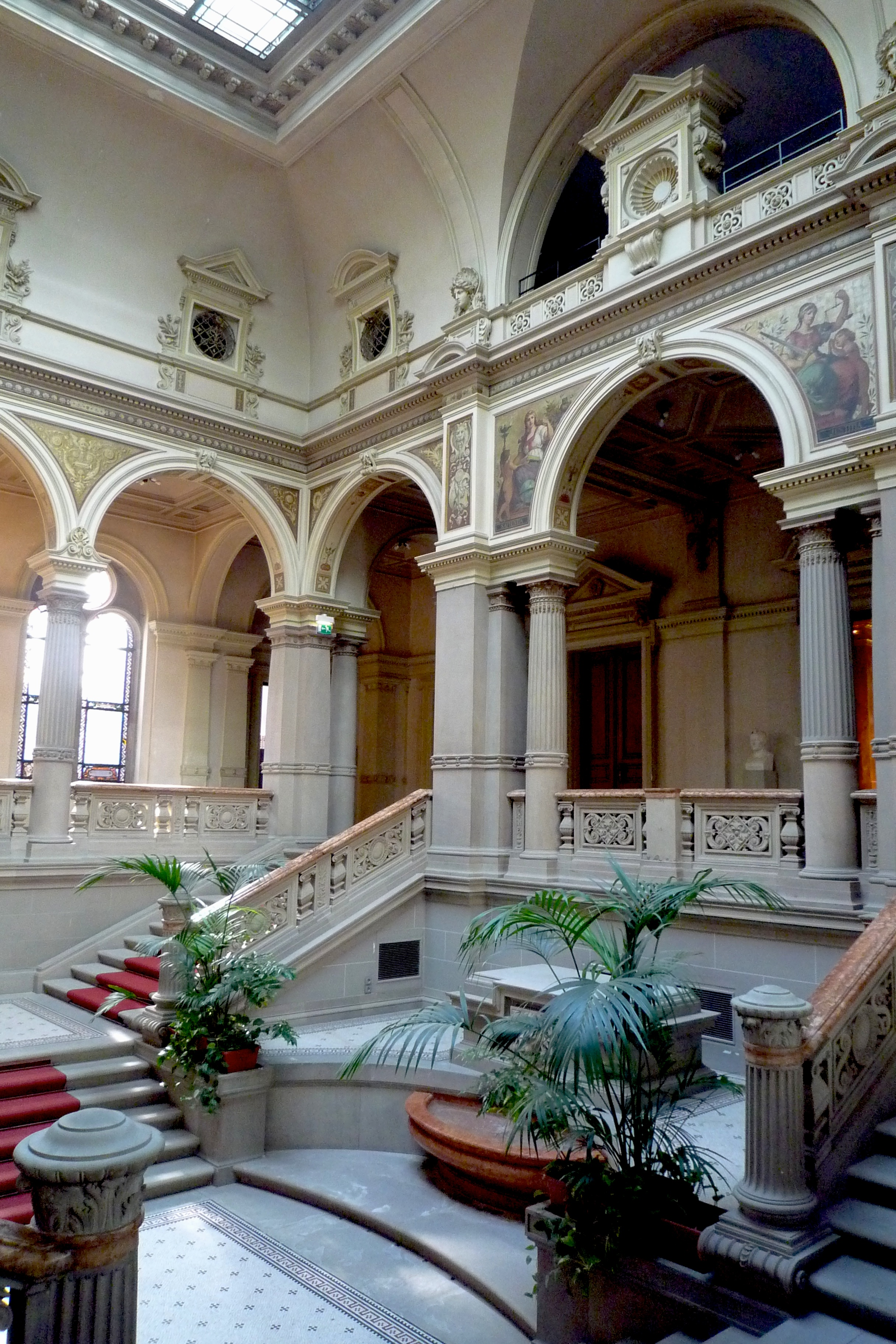 Strasbourg, Palais du Rhin, le grand escalier